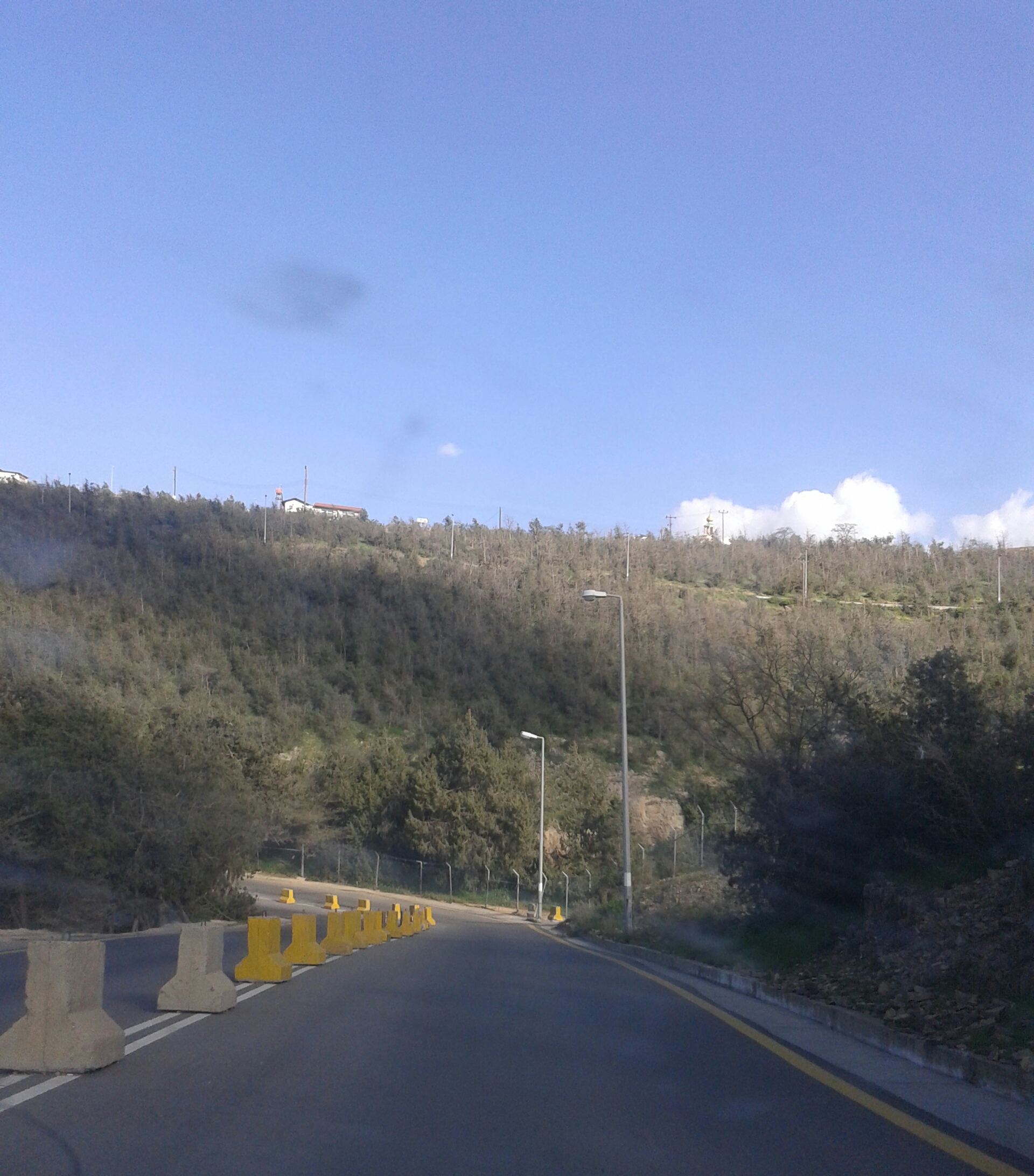 غابة رغدان في مدينة الباحة